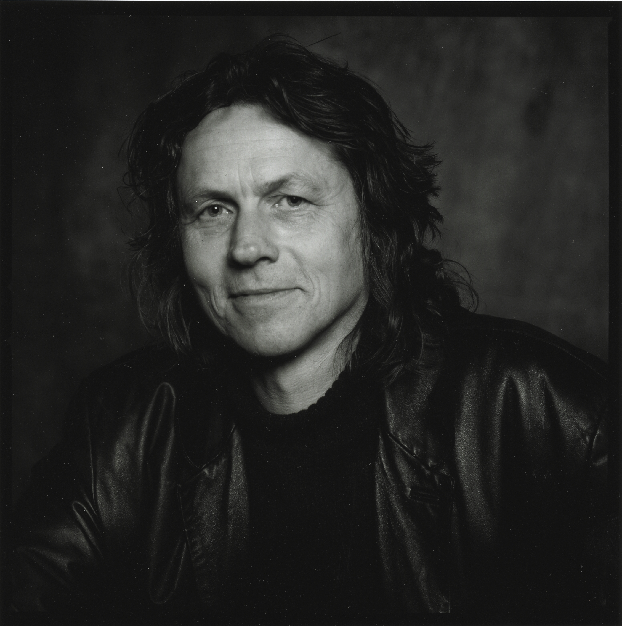 Norwegian author Stein Erik Lunde (born 1953)